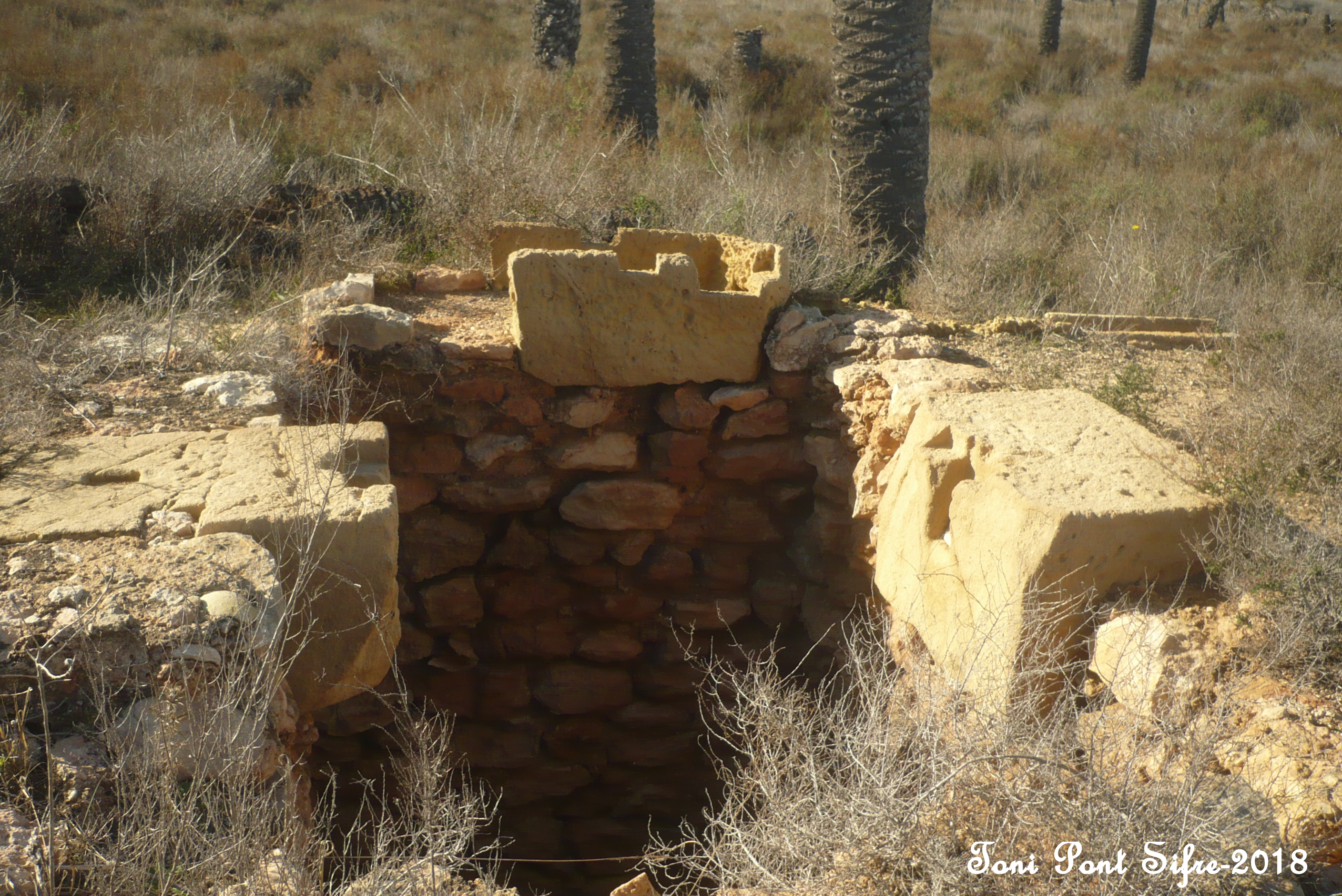 Pou, carreus i pilleta de distribució de l'aigua.